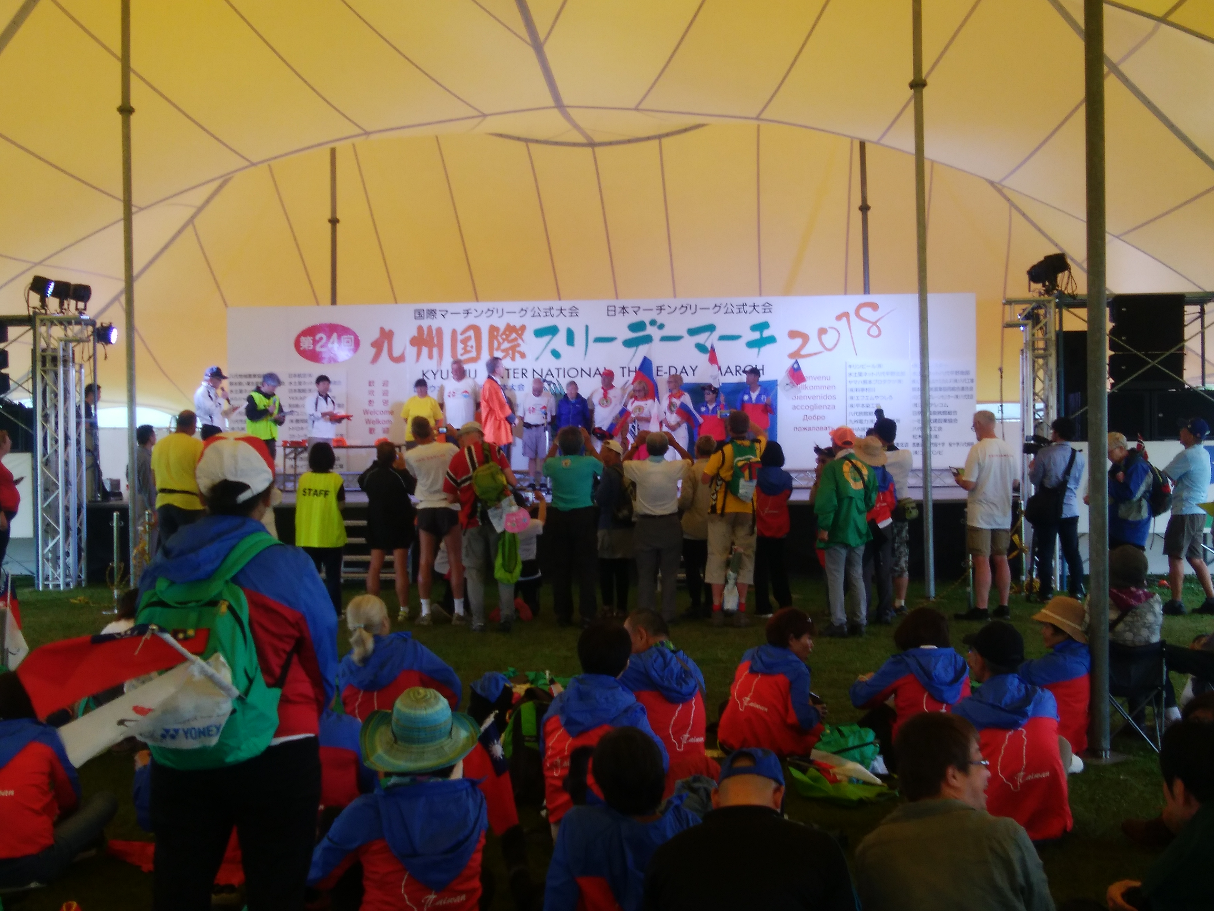 九州国際スリーデーマーチ（2018年大会会場）